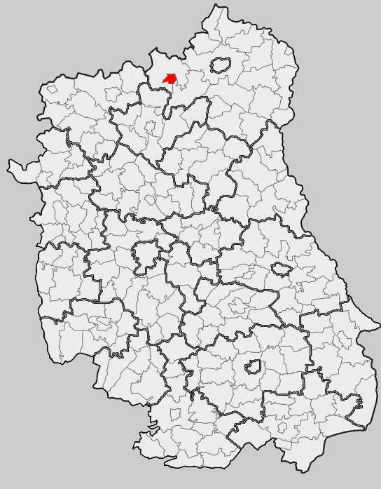 Map of gmina Międzyrzec Podlaski (urban), Biała Podlaska county, Lublin voivodship Mapa gminy Międzyrzec Podlaski(miejska), powiat bialski, województwo lubelskie